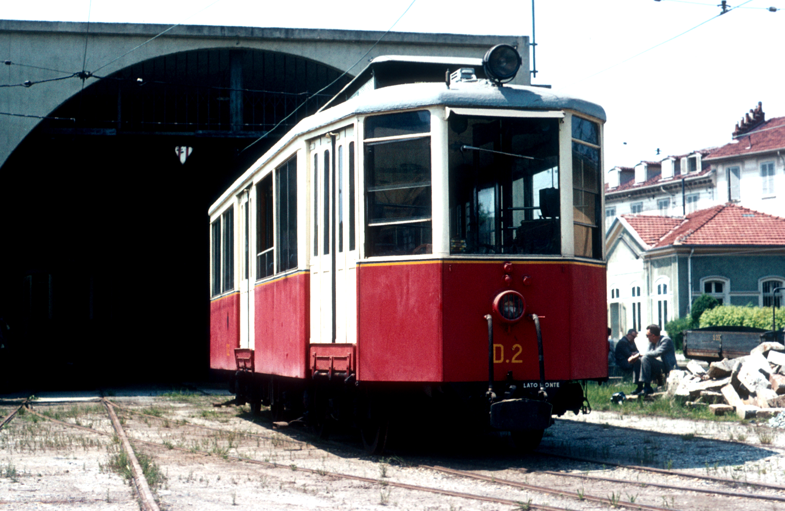 Tandradbahn Sassi-Superga motorrijuig D.2 op 16 mei 1976. (dia: 31947)